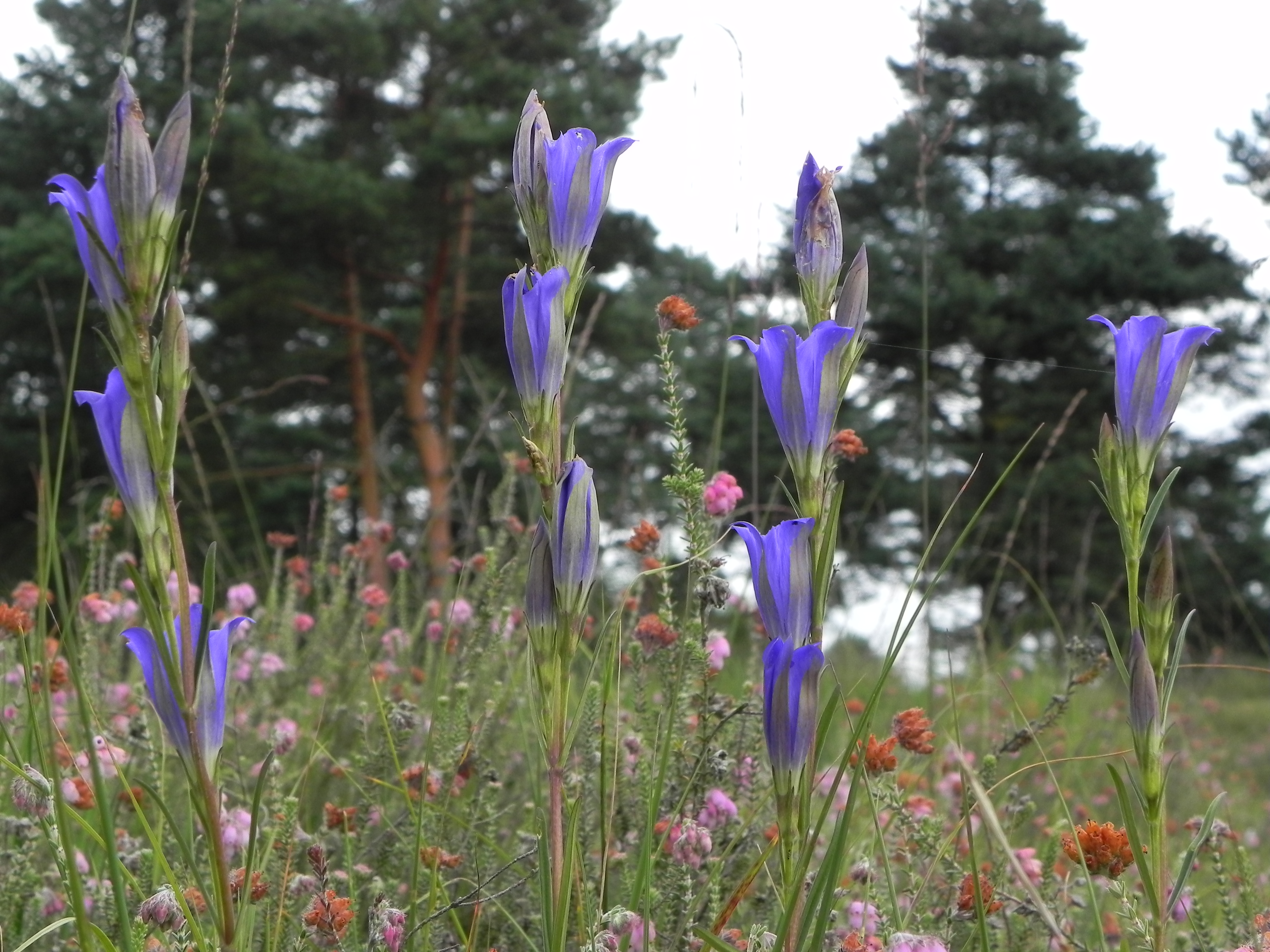 Lungenenzian (Gentiana_pneumonanthe) Südheide (Germany)